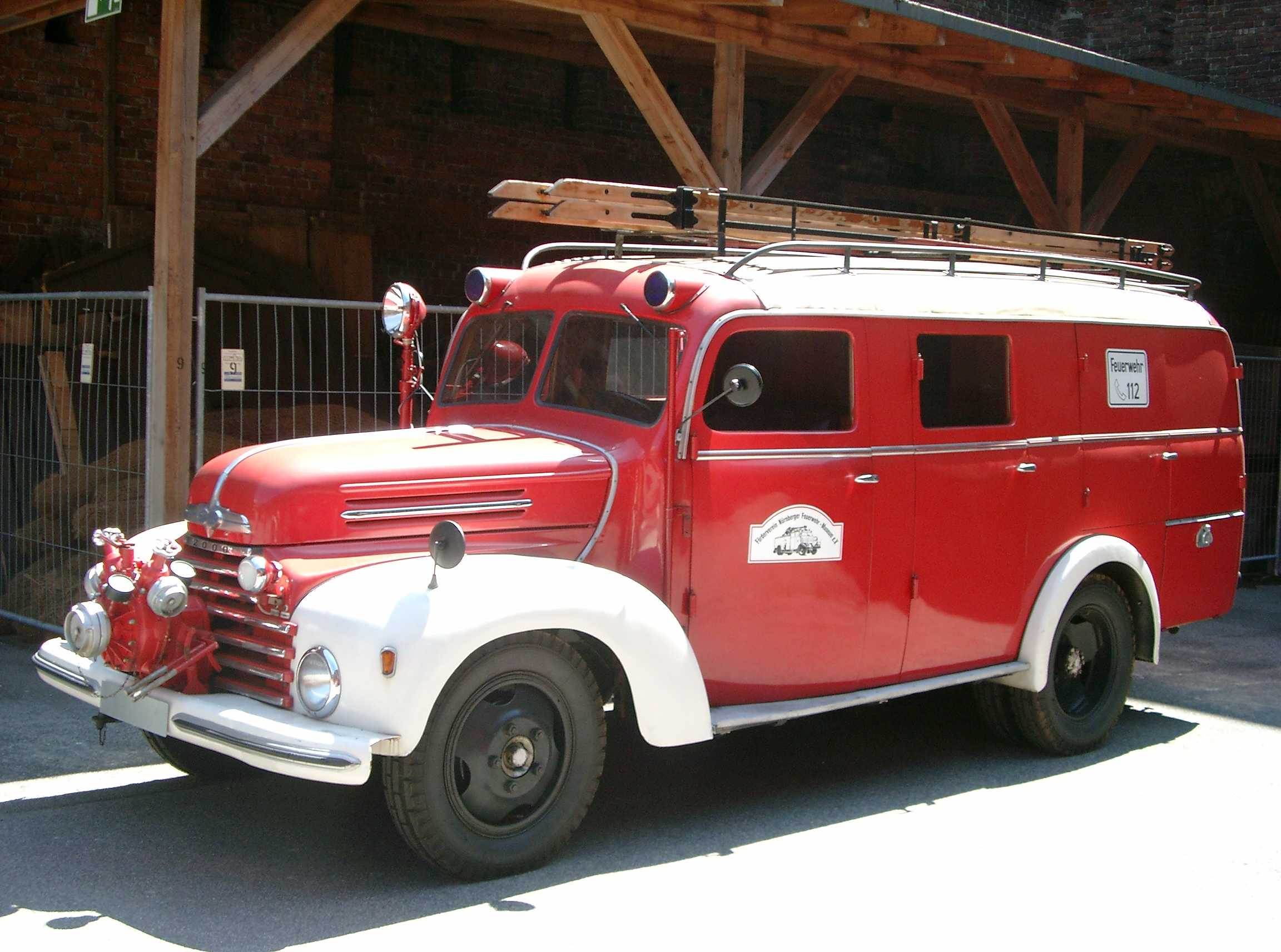 Löschgruppenfahrzeug LF 8 (ehemals FFW Röthenbach)